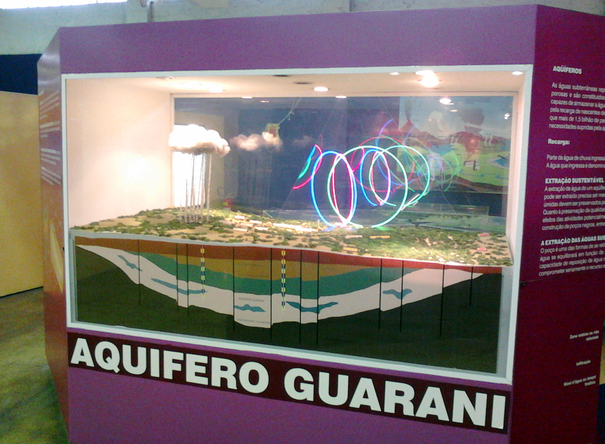 Exposição Aquífero Guarani, Estação Ciência, SP.